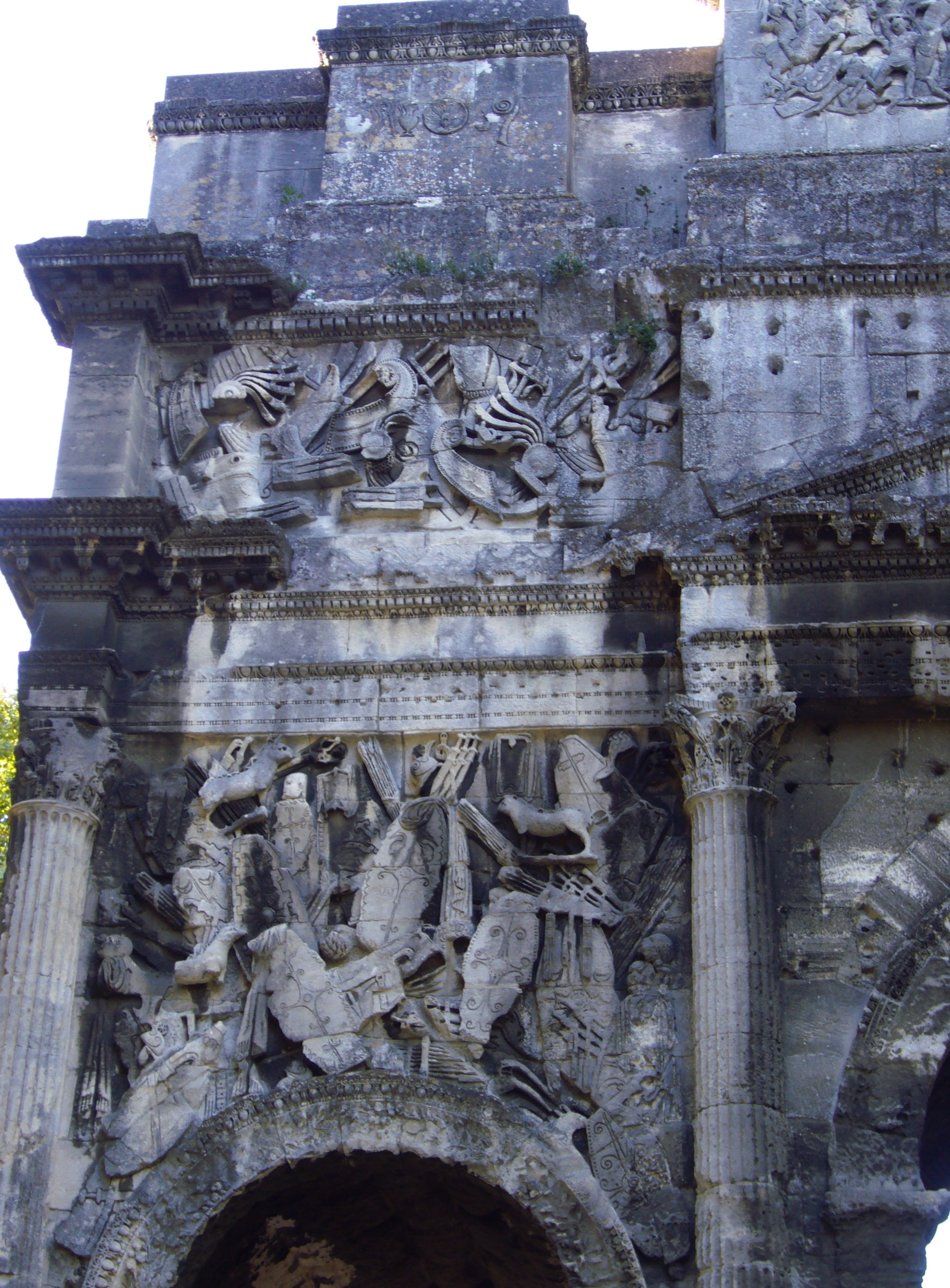 Arc d’Orange, partie de la façade du sud.